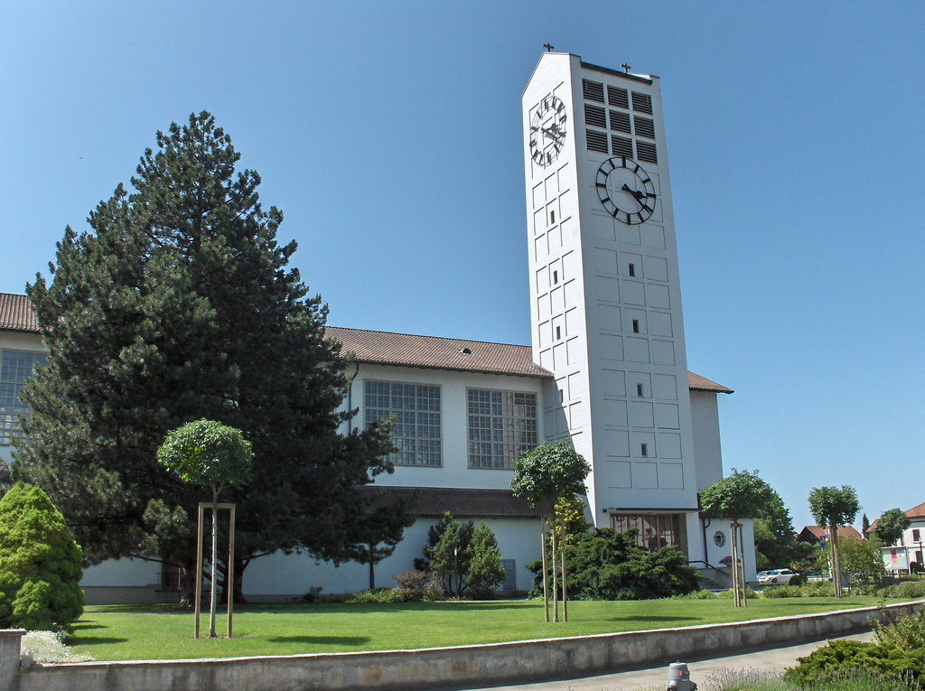 Katholische Kirche in Amriswil, Thurgau, Switzerland